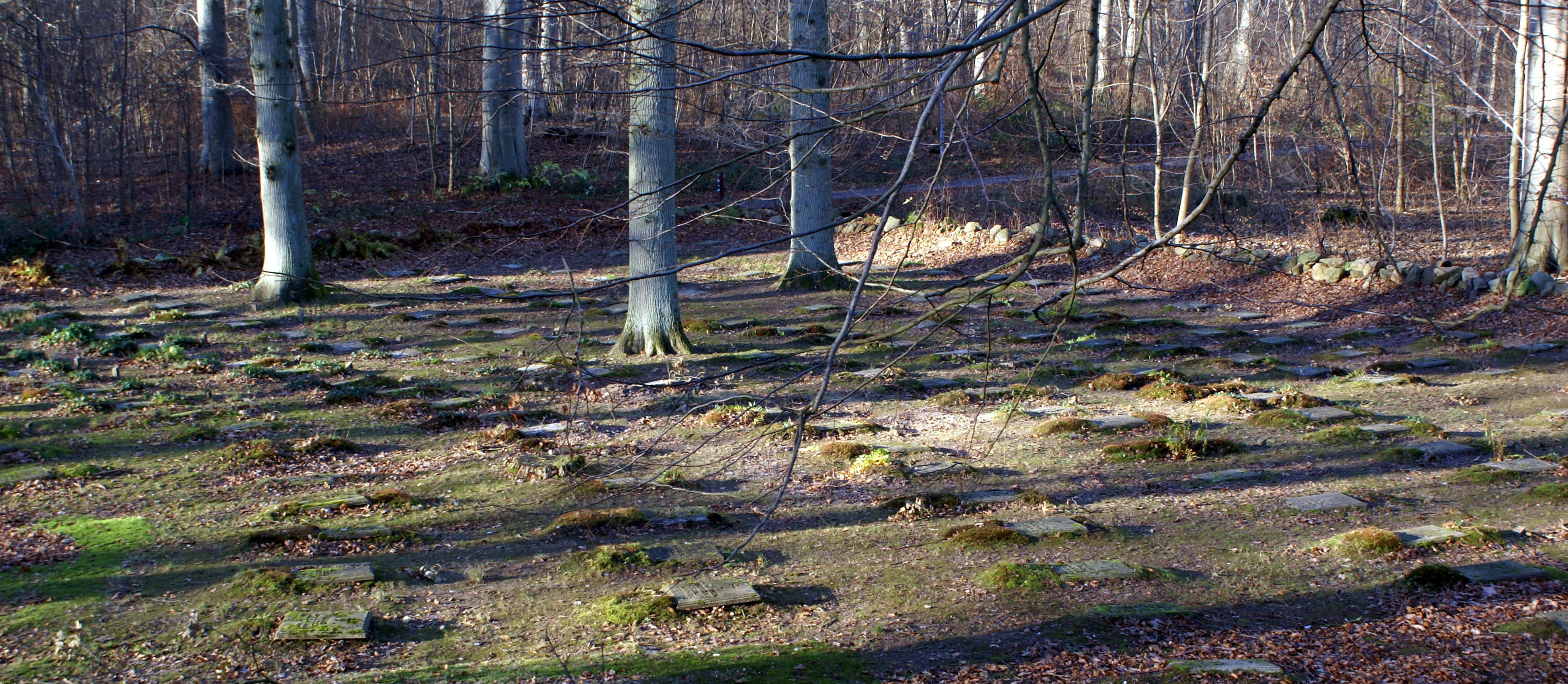 De hjerneløses kirkegård. Kirkegården på SNS.